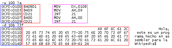 Muestra de código de máquina y lenguaje assembler del Intel 8088. El código de máquina se resalta en rojo, el código assembler en magenta y las direcciones de memoria donde se encuentra el código, en azul.